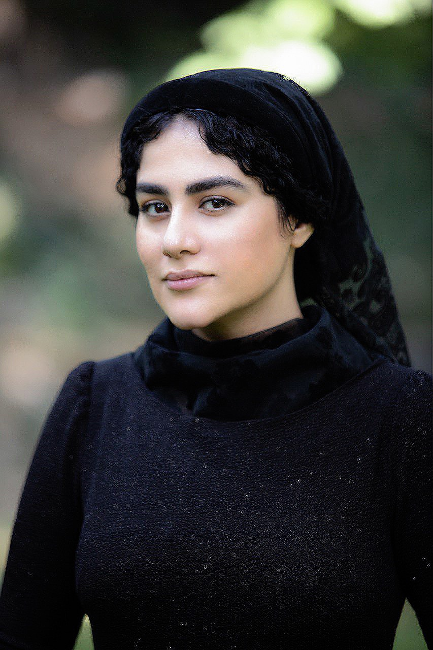 سحر محمدی خواننده موسیقی کلاسیک ایرانی در فستیوال موسیقی در شهر پاریس کشور فرانسه